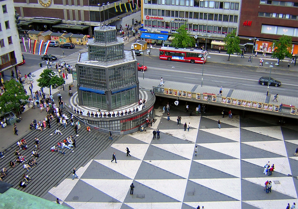 Café Muttern, Sergels torg juni 2004 (revs i augusti 2004)